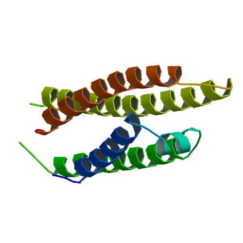 Apolipoprotein E.